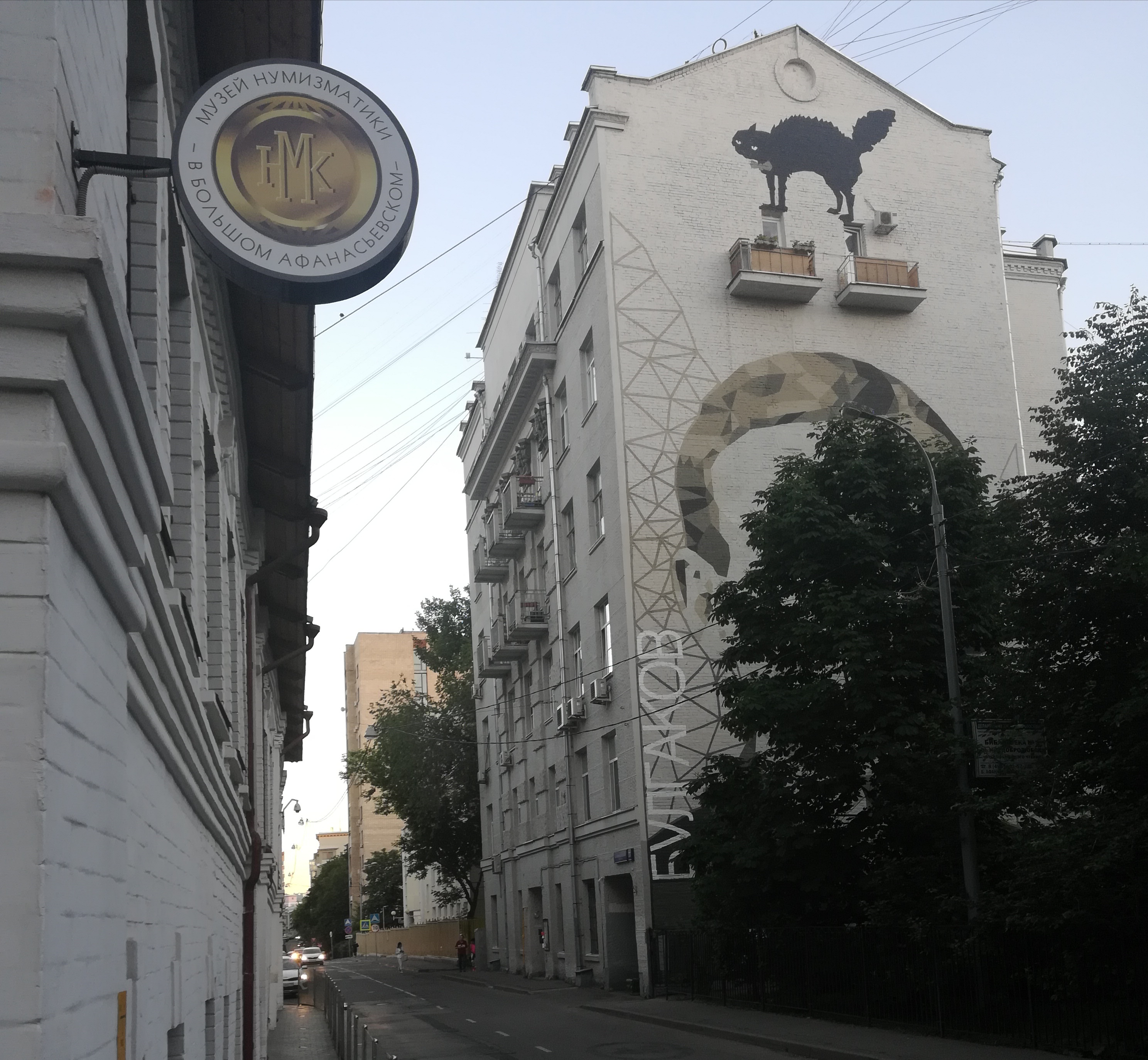 Большой Афанасьевский переулок. Слева дом 24 - Палаты Зиновьевых-Юсуповых - конец XVII века с позднейшими перестройками. Справа дом 33 - доходный дом А. М. Юкина, арх. В. Е. Дубовской, 1914-1915.